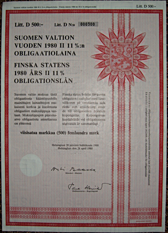 Suomen valtion obligaatio vuodelta 1980.